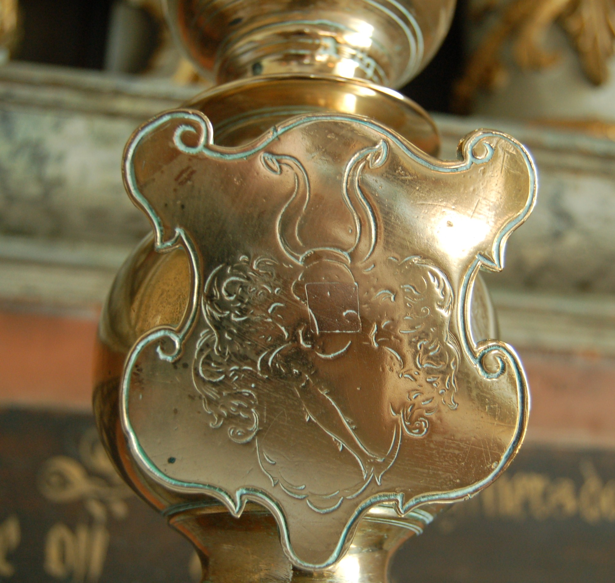 Ove Gjedde's våpen i Tjølling kirke (lysestake).